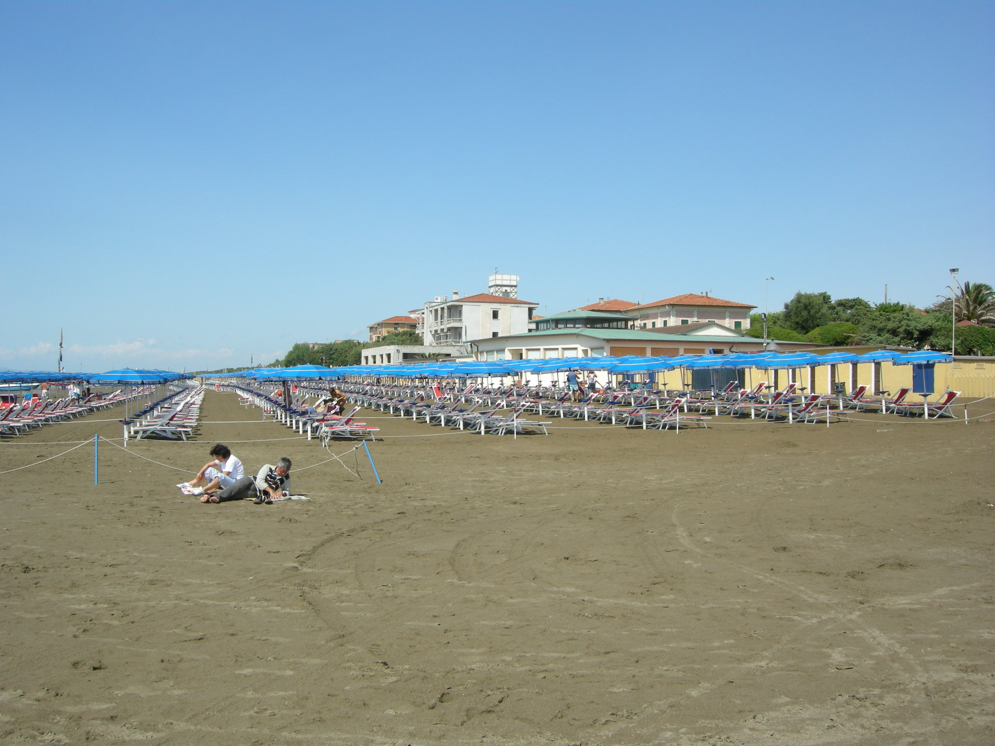 Spiaggia di marina di castagneto